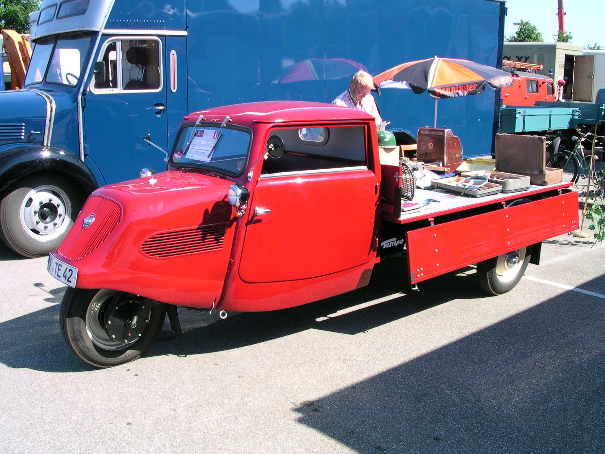 großes Oldtimertreffen im Mercedes-Werk in Wörth am Rhein 2006